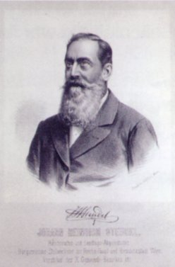 Johann Heinrich Steudel, Bezirksvorsteher von Favoriten (1875-1883)